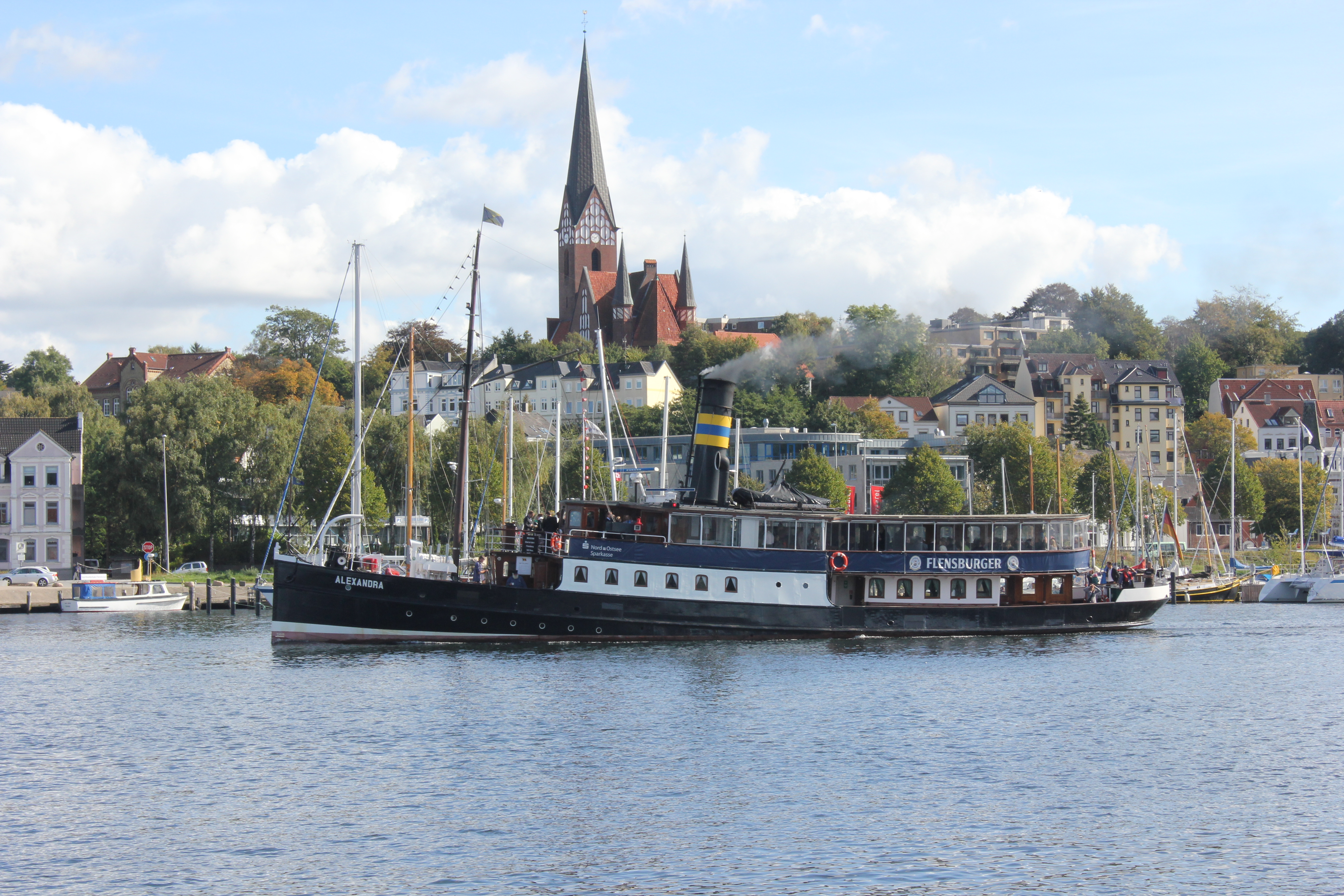 Dampfer Alexandra mit St. Jürgen-Kirche (Flensburg) im Hintergrund